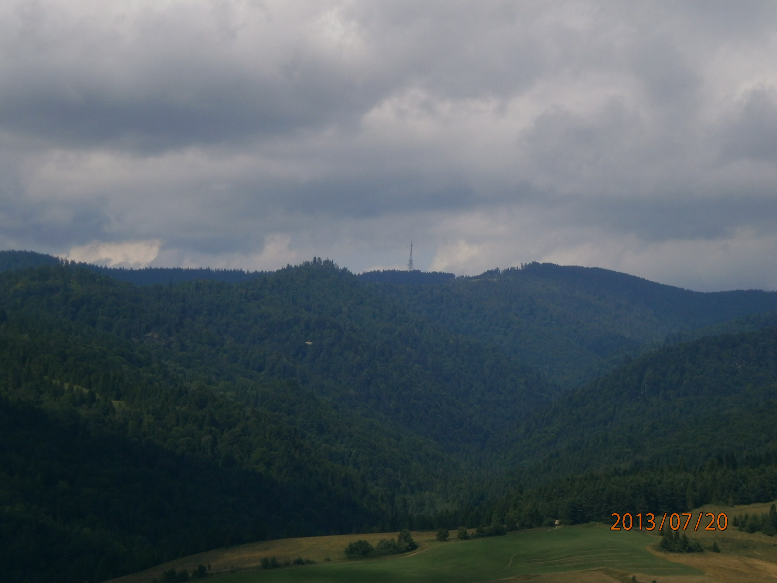 Widoczny jest m. in. przemiennik radiowo-telewizyjny. Zdjęcie wykonano z punktu widokowego w Jaworkach w 2013 roku.